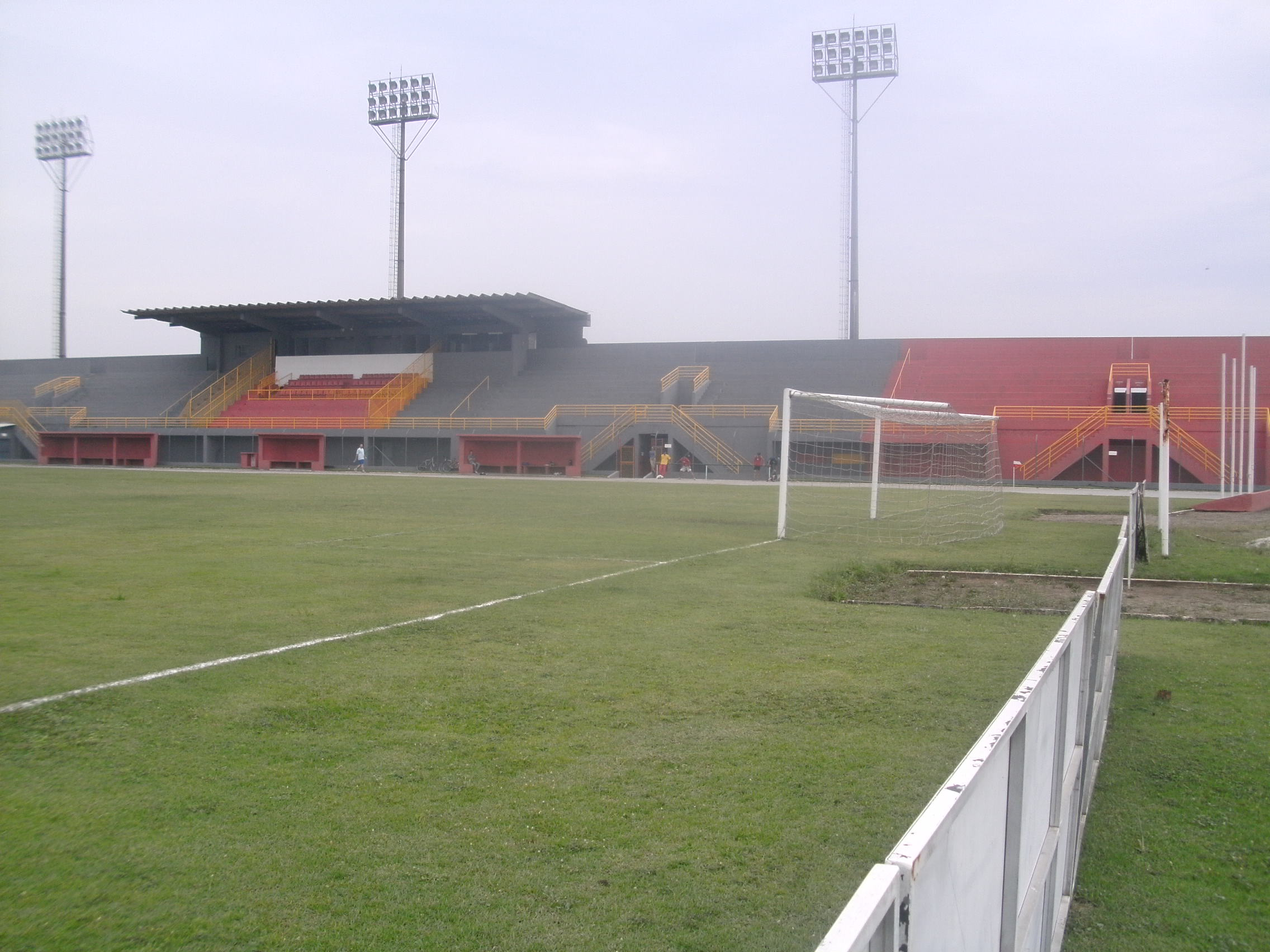 Patinhas esteve aqui - Estadio Suzano 3